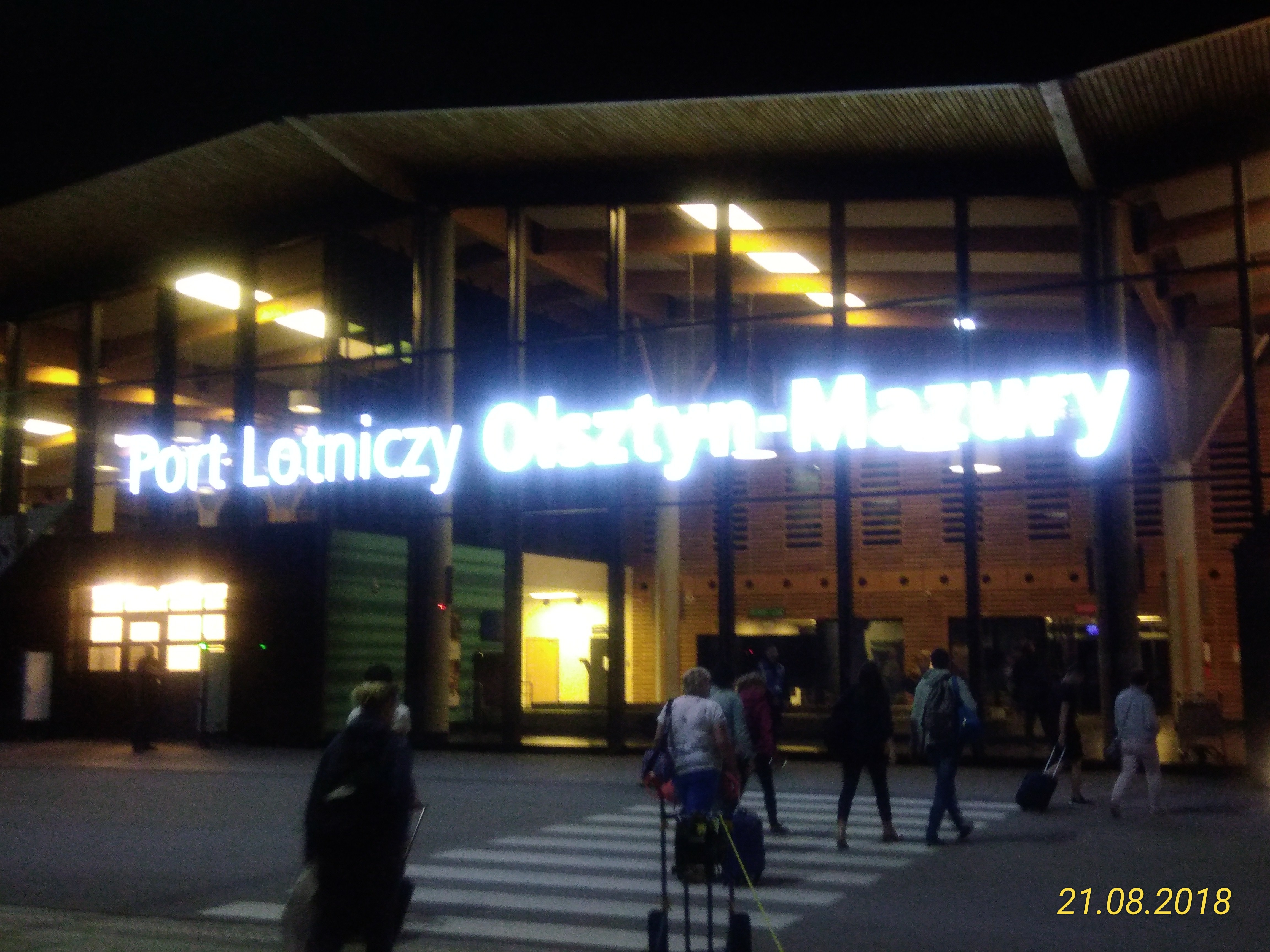 Widok na terminal Olsztyn-Mazury od strony płyty postojowej